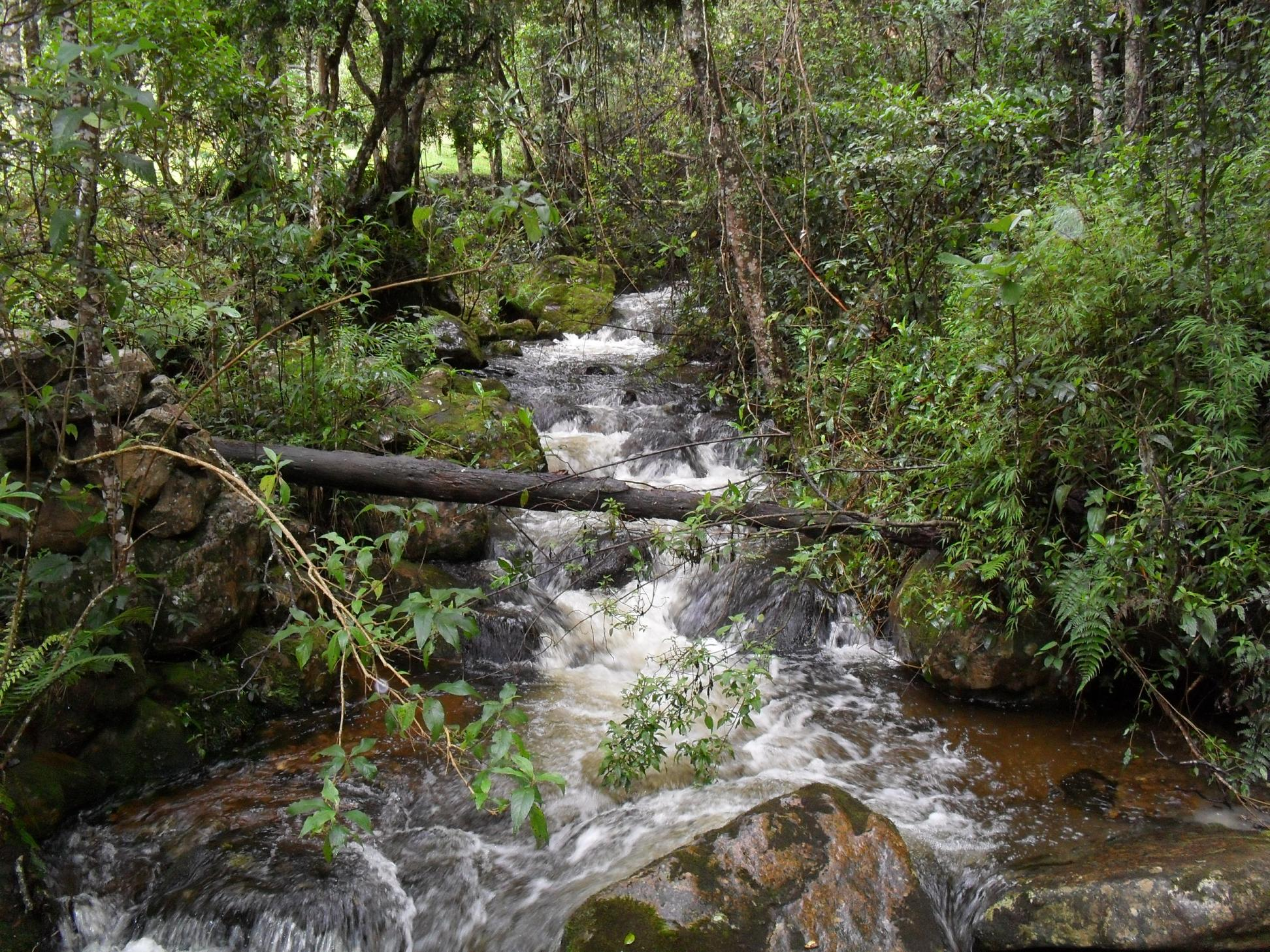 Bosque Andino en el Santuario de Fauna y Flora de Iguaque, departamento de Boyacá, Colombia